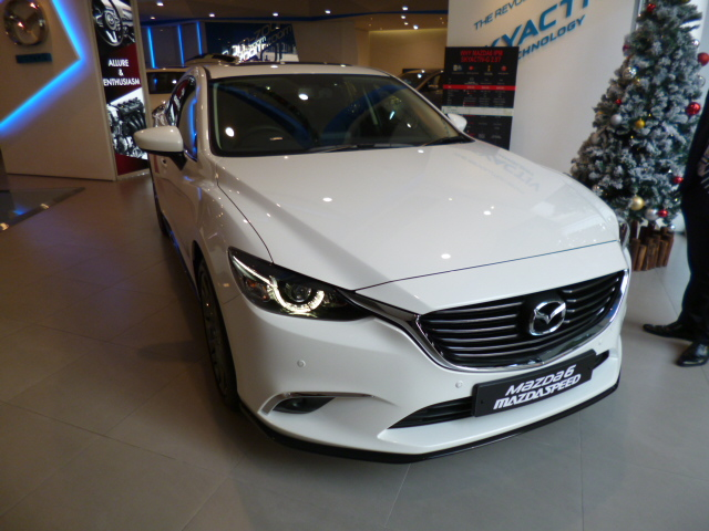 マツダ・GJ